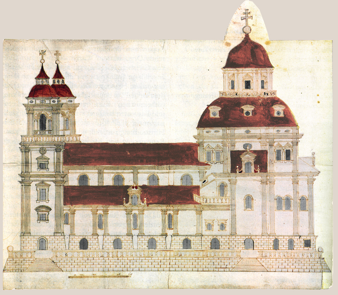 St. Lorenz, Kempten: Die Südfassade, wie sie Giovanni Serro um 1659 zeichnete. Er betonte farblich die Tektonik und setzt Pilaster und Einfassungen von den hellen Fassadenflächen ab. Der Plan wurde nicht vollständig umgesetzt. So fehlen die geplanten Turm-Obergeschosse ebenso wie die terrassierte Sockelzone.